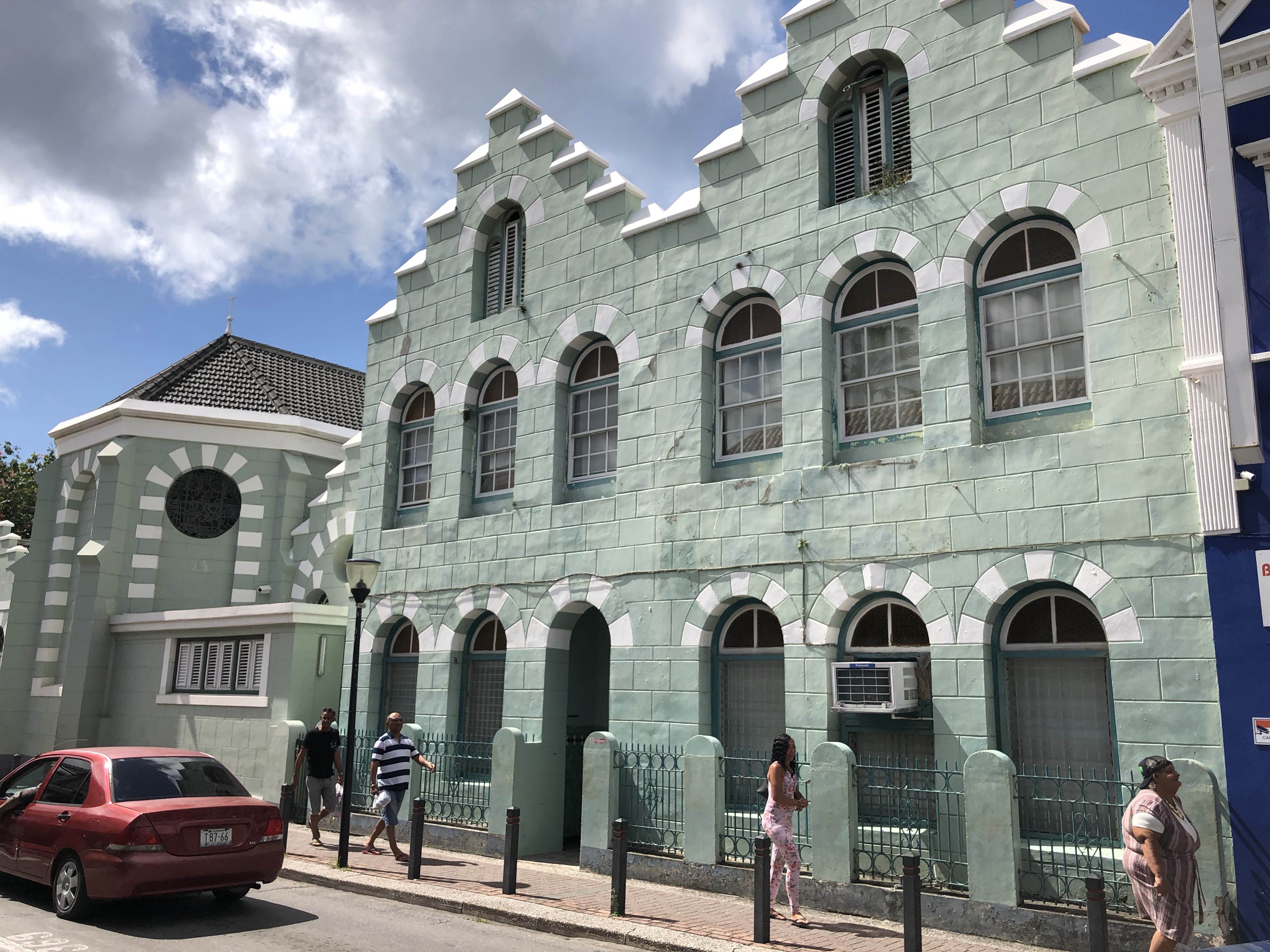 Het parochiehuis van de Basiliek Santa Ana 31X